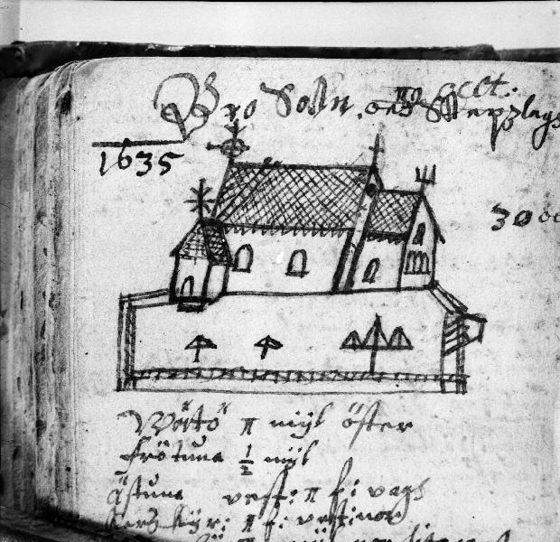 Kyrkan 1635, teckning av Rhezelius, avfotograferad. Kategori: (01) ExteriörerKyrkan 1635, teckning av Rhezelius, avfotograferad.